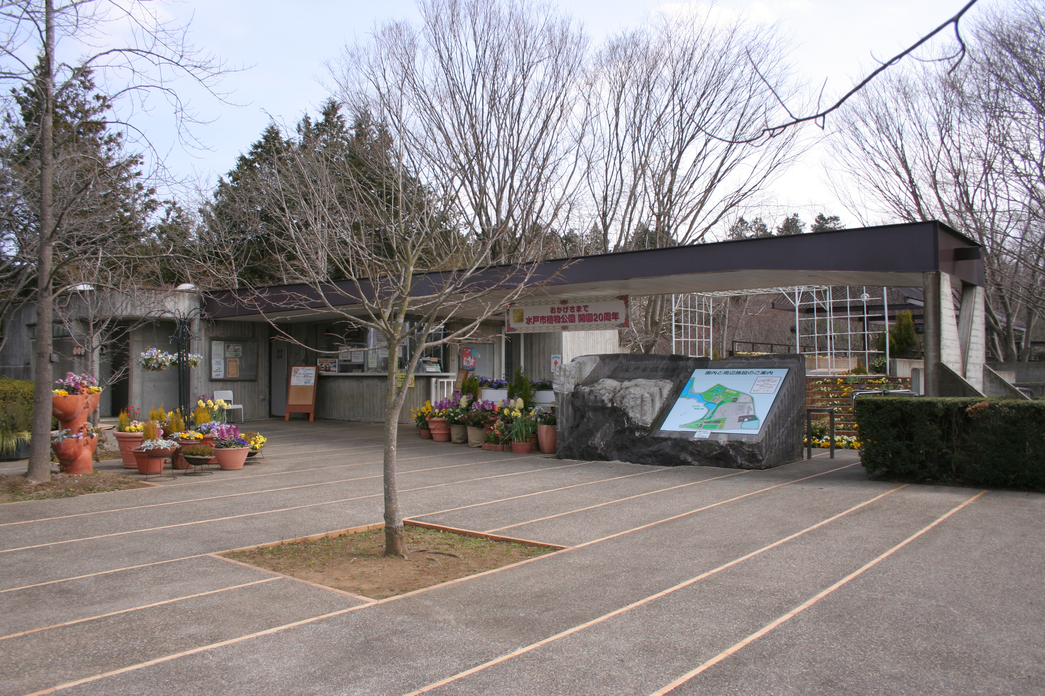 開園20周年の水戸市植物公園